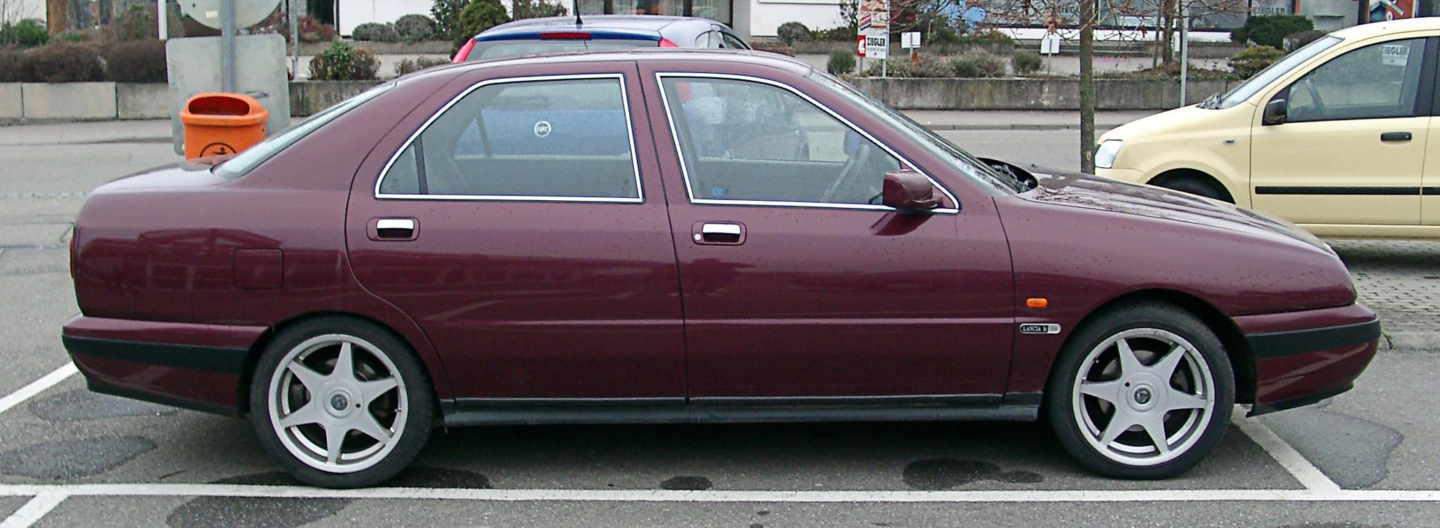 Lancia Kappa, Baujahr 1996